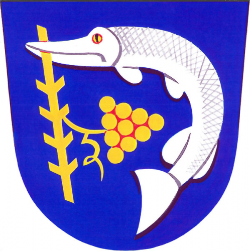 znak obce Nedachlebice